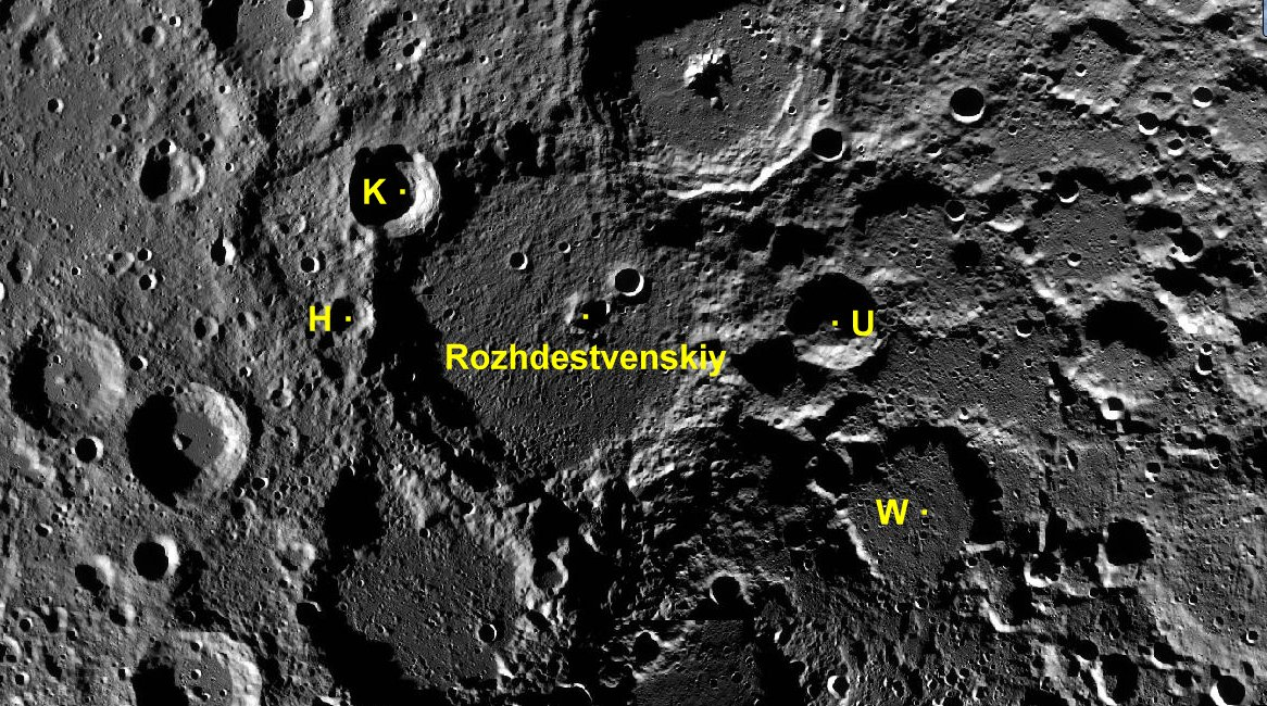 Cráter lunar Rozhdestvenskiy. Cráteres satélite. (Imagen LRO)